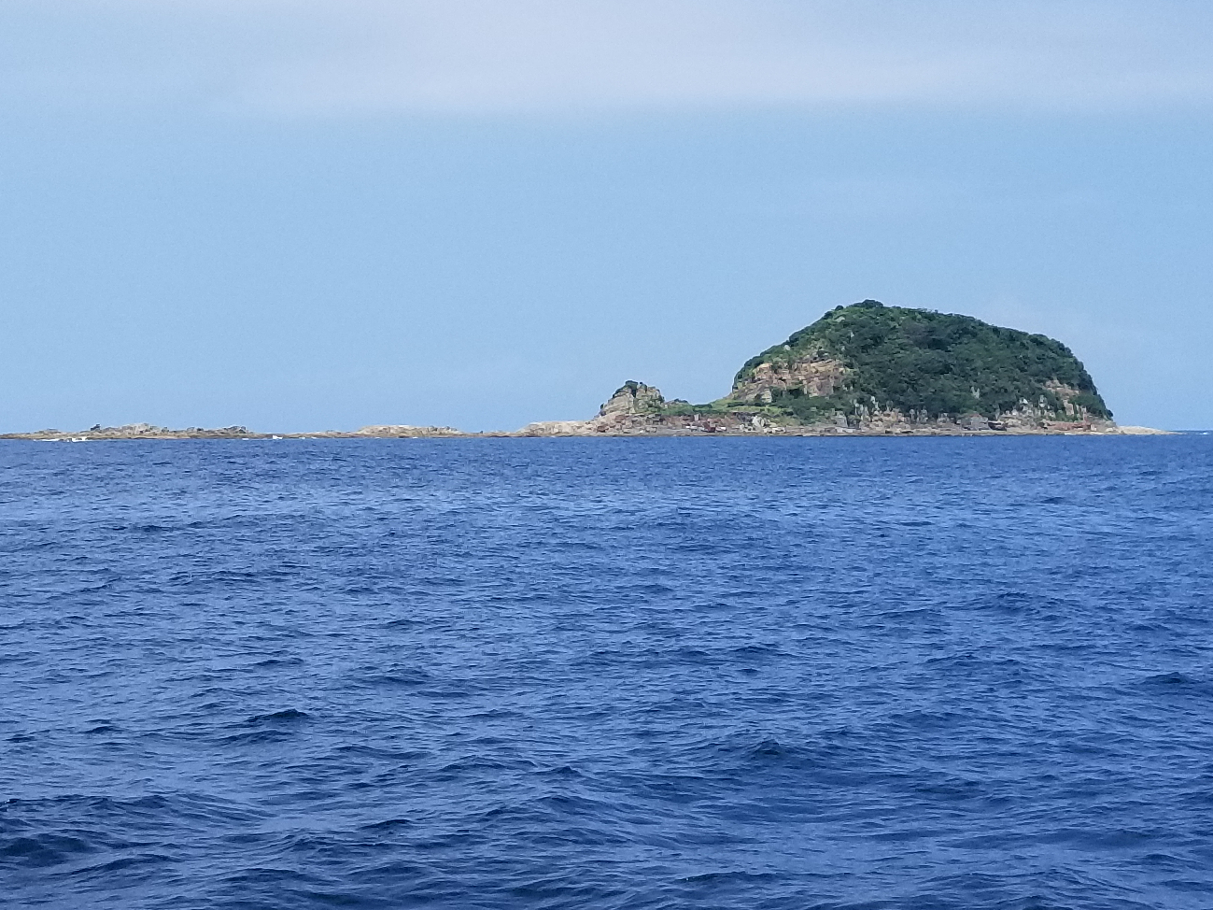 中ノ島（長崎県長崎市）